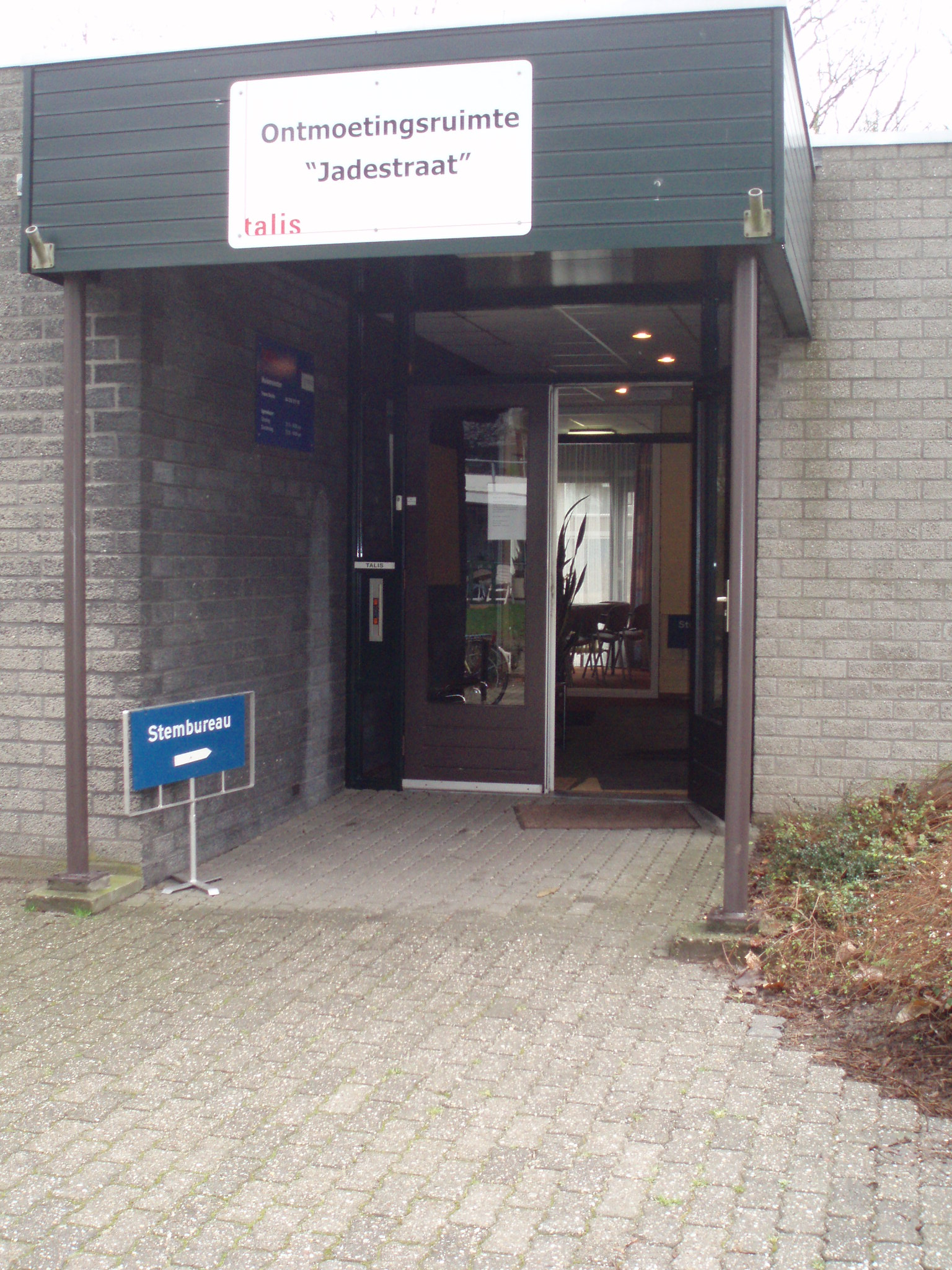 Eigen foto Looi 2006